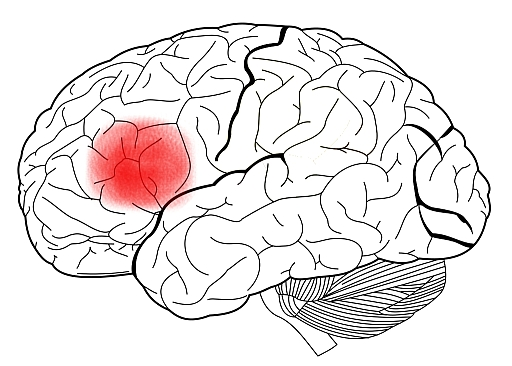 área de comprensión gramatical y motorización del lenguaje